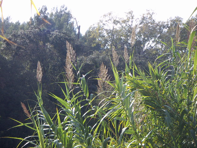 Arundo donax a la Muga. autor:Jordi Coll Costa Jordi coll costa 13:48, 26 November 2006 (UTC)